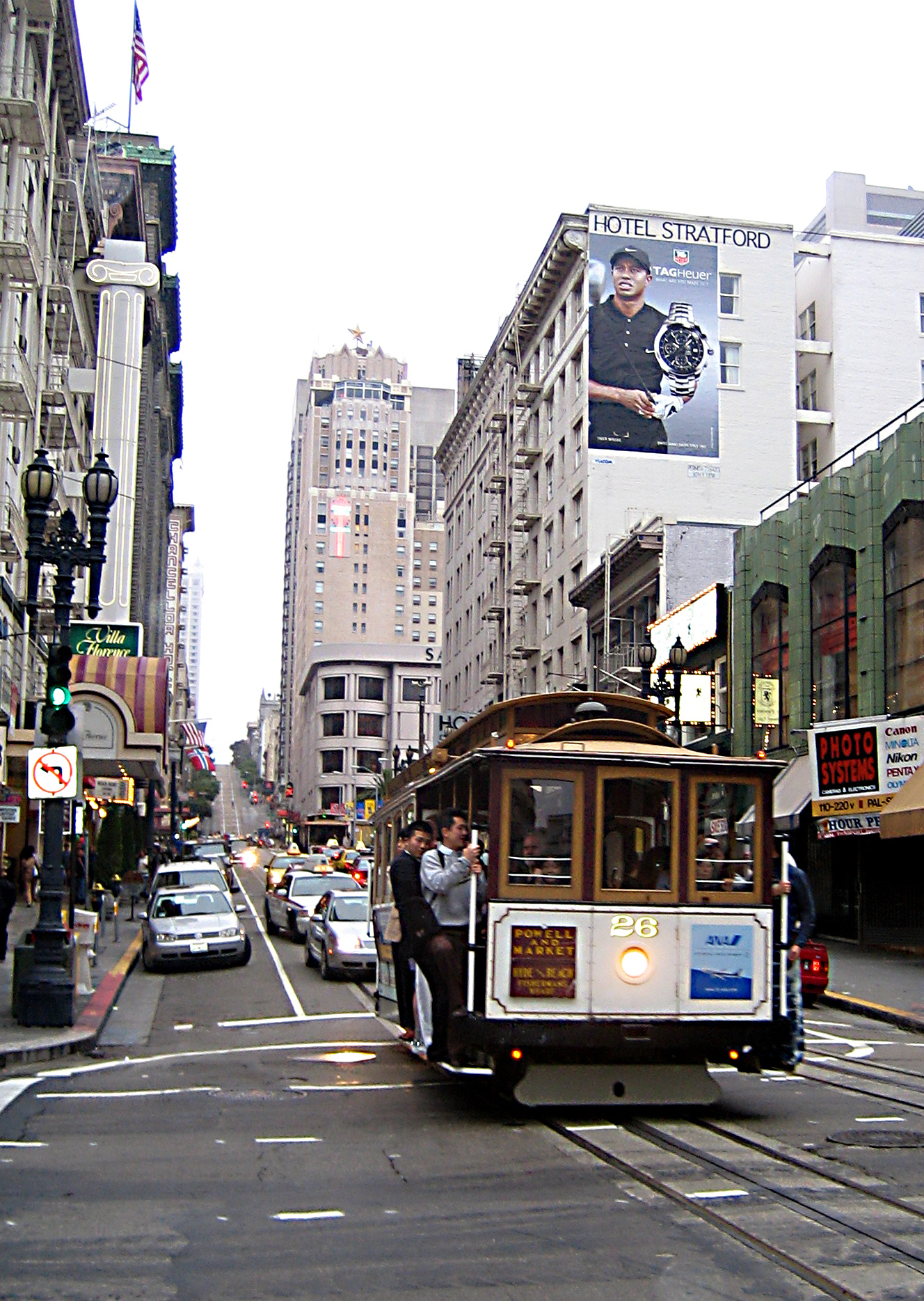 powell st